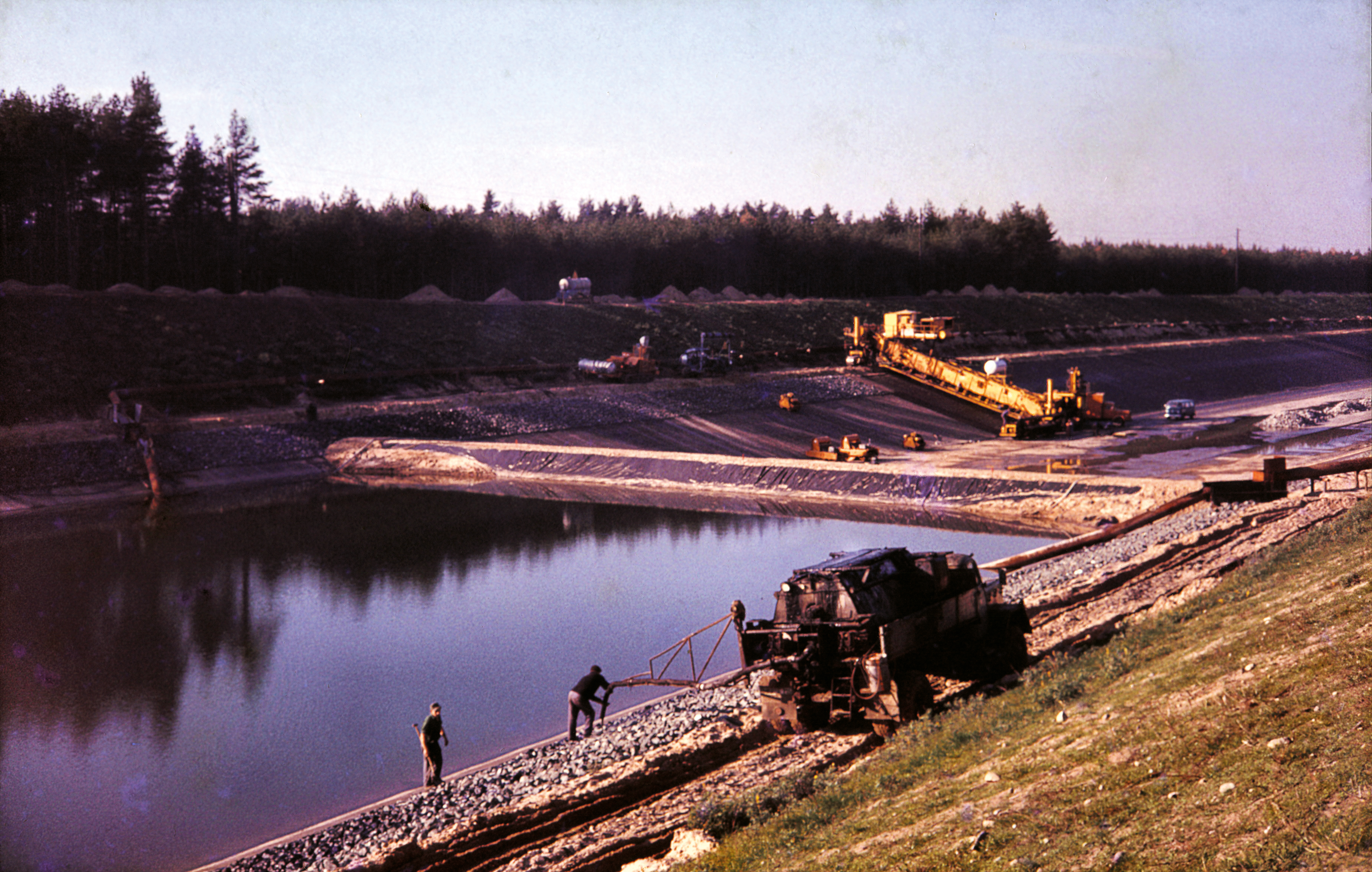 Elbeseitenkanal im Bau September 1971 bei Lüneburg - Vordergrund: Verklammerung der Steinschüttung; Hintergrund: Schrägfertiger für die Asphaltdichtung der Böschung